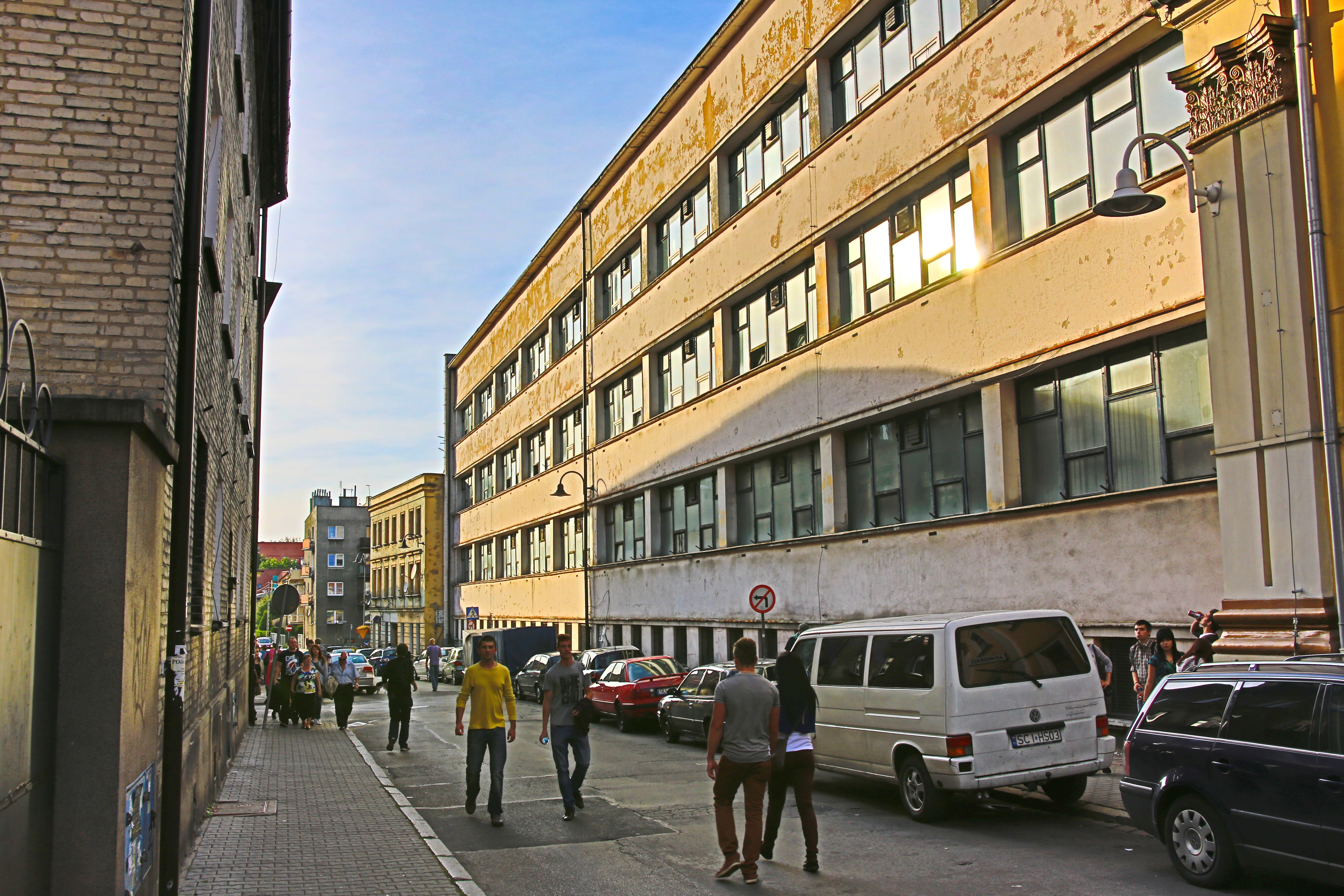 Tarnowskie Góry